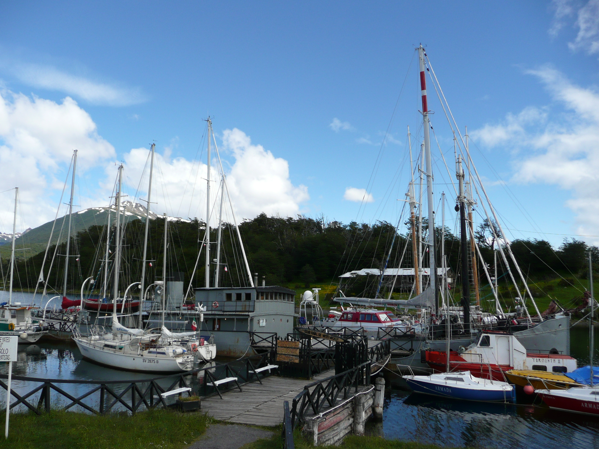 Le Micalvi, Port de plaisance de Puerto Williams (Chili, Terre de Feu)